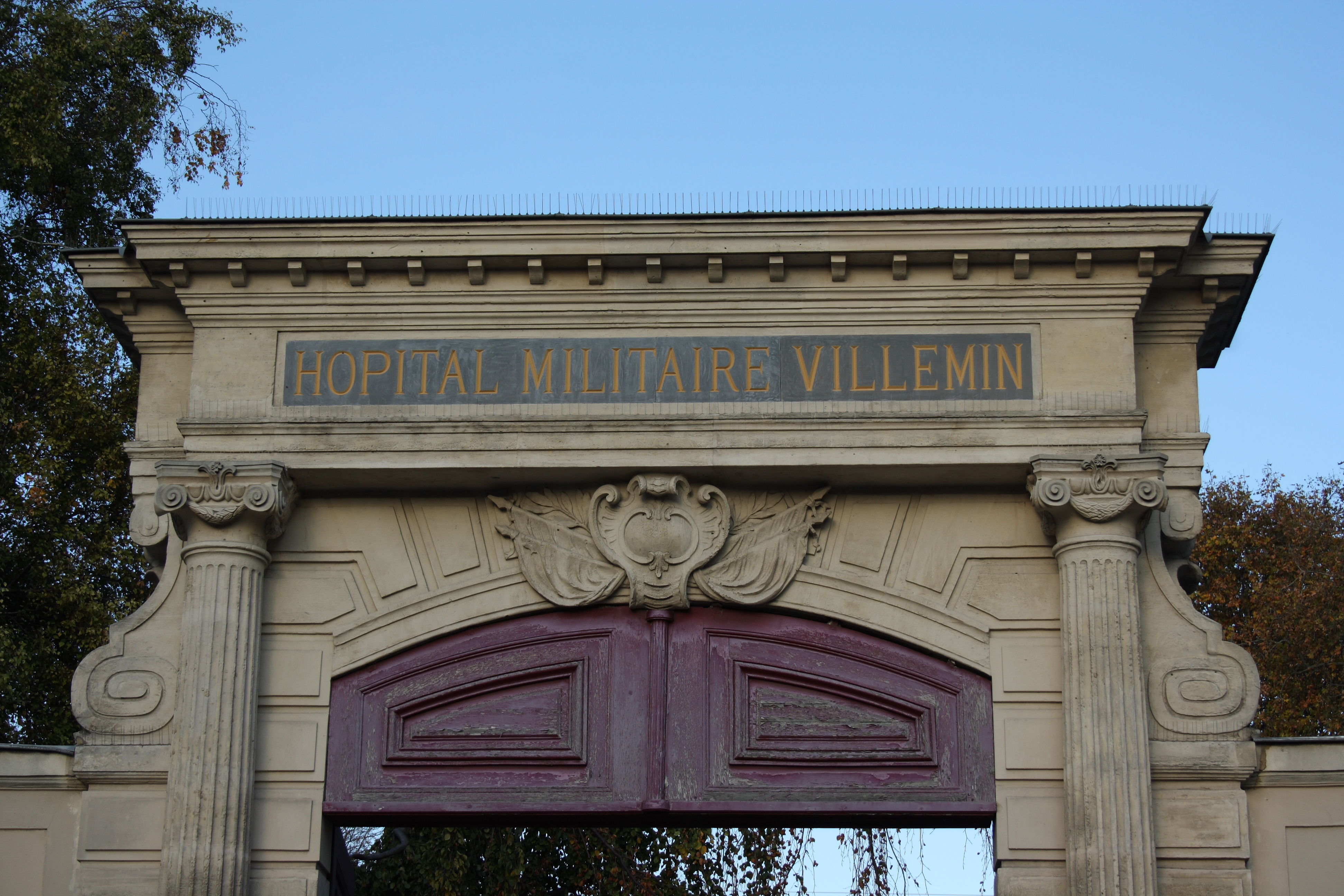 Ehemaliges Rekollektenkloster Couvent des Récollets im 10. Arrondissement von Paris, Eingang des Militärkrankenhauses (Hôpital Militaire Villemin)